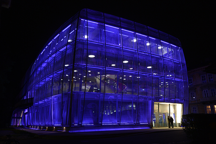 Das Foto zeigt das am 1. März 2009 eröffnete Haus für Musik und Musiktheater (MUMUTH) der Kunstuniversität Graz in Veranstaltungsbeleuchtung